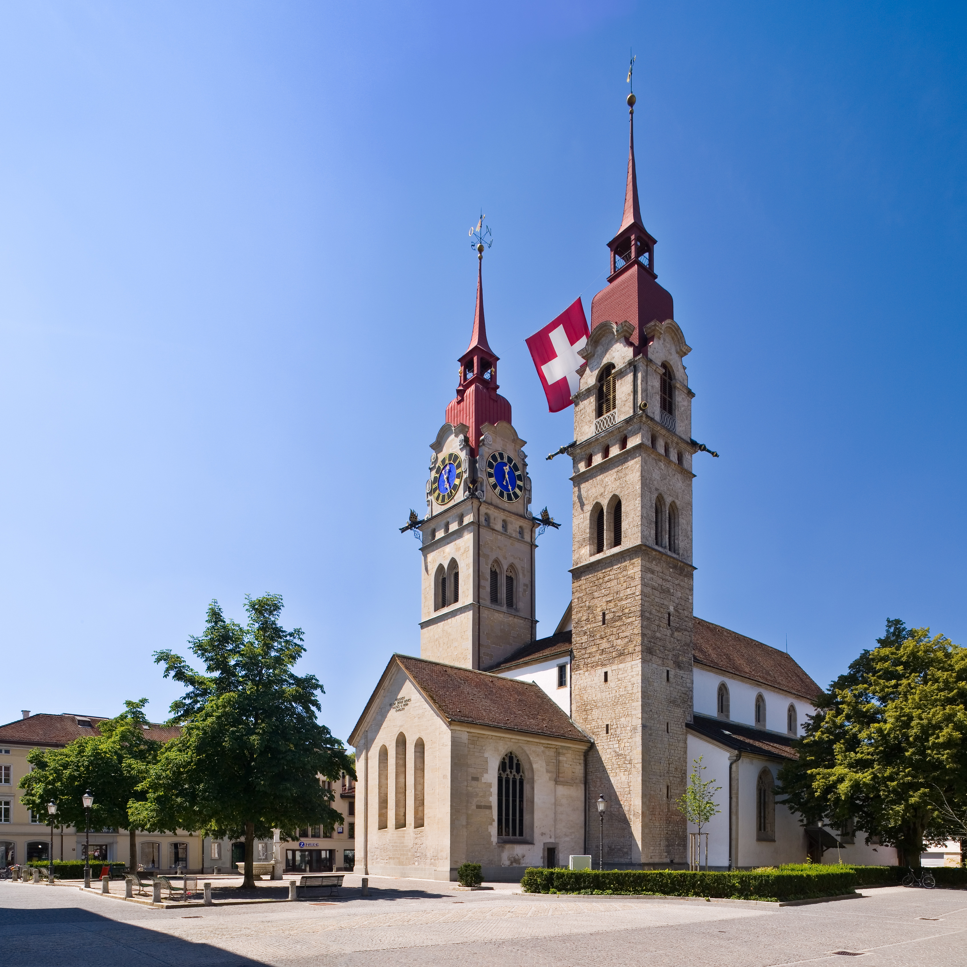 Die Stadtkirche Winterthur (Schweiz) von Nordosten gesehen.